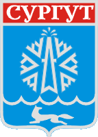 Герб города Сургут, 1975 год.